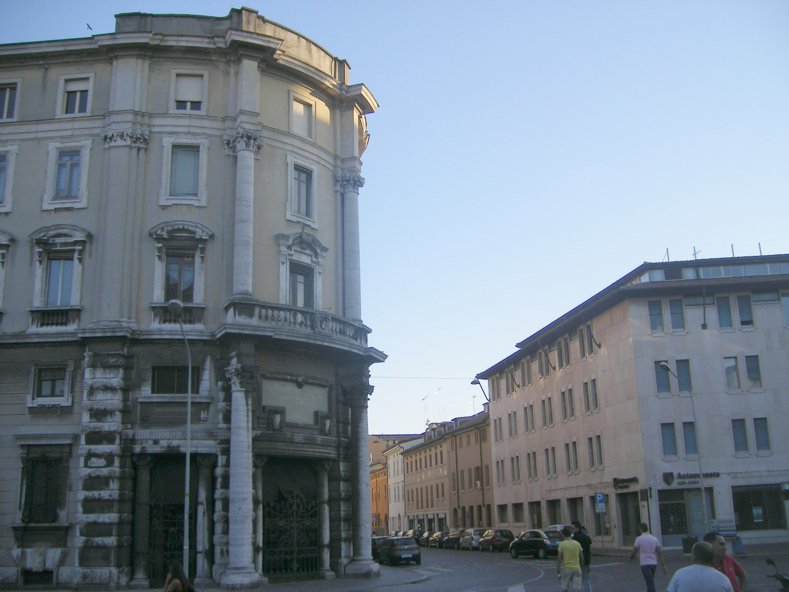 Mantova. Ingresso di via Principe Amedeo da piazza Martiri di Belfiore. Sulla sinistra il Palazzo dei Sindacati, costruito nel 1929, dopo l'abbattimento della Caserma Landucci, già sede dell'invitto 114º Reggimento di Fanteria "Mantova", istituita nel 1866 riattando i locali dell'antico Convento di San Domenico e dedicata a Ferdinando Landucci, comandante dei Volontari Toscani, caduto nella Battaglia di Curtatone e Montanara. In questa piazza, l'11 settembre 1943, venne fucilata Giuseppina Rippa.